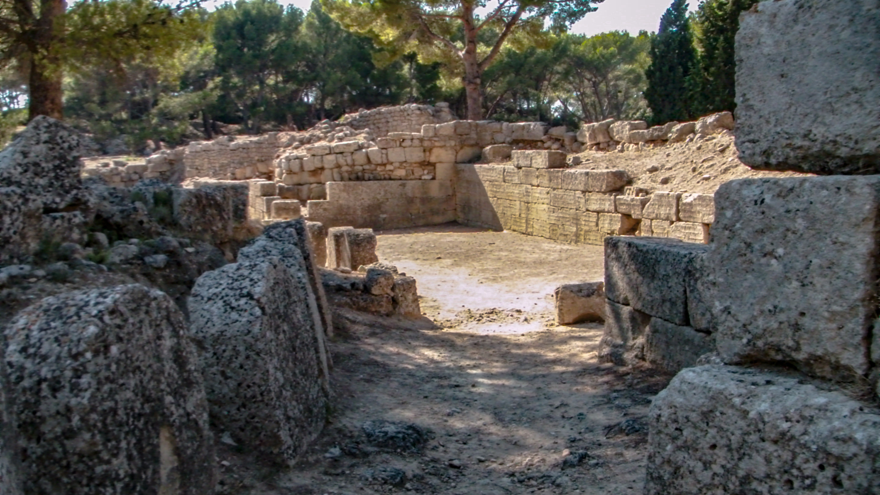 L'oppidum de Saint-Blaise est un site archéologique majeur en Méditerranée occidentale, situé sur la commune de Saint-Mitre-les-Remparts